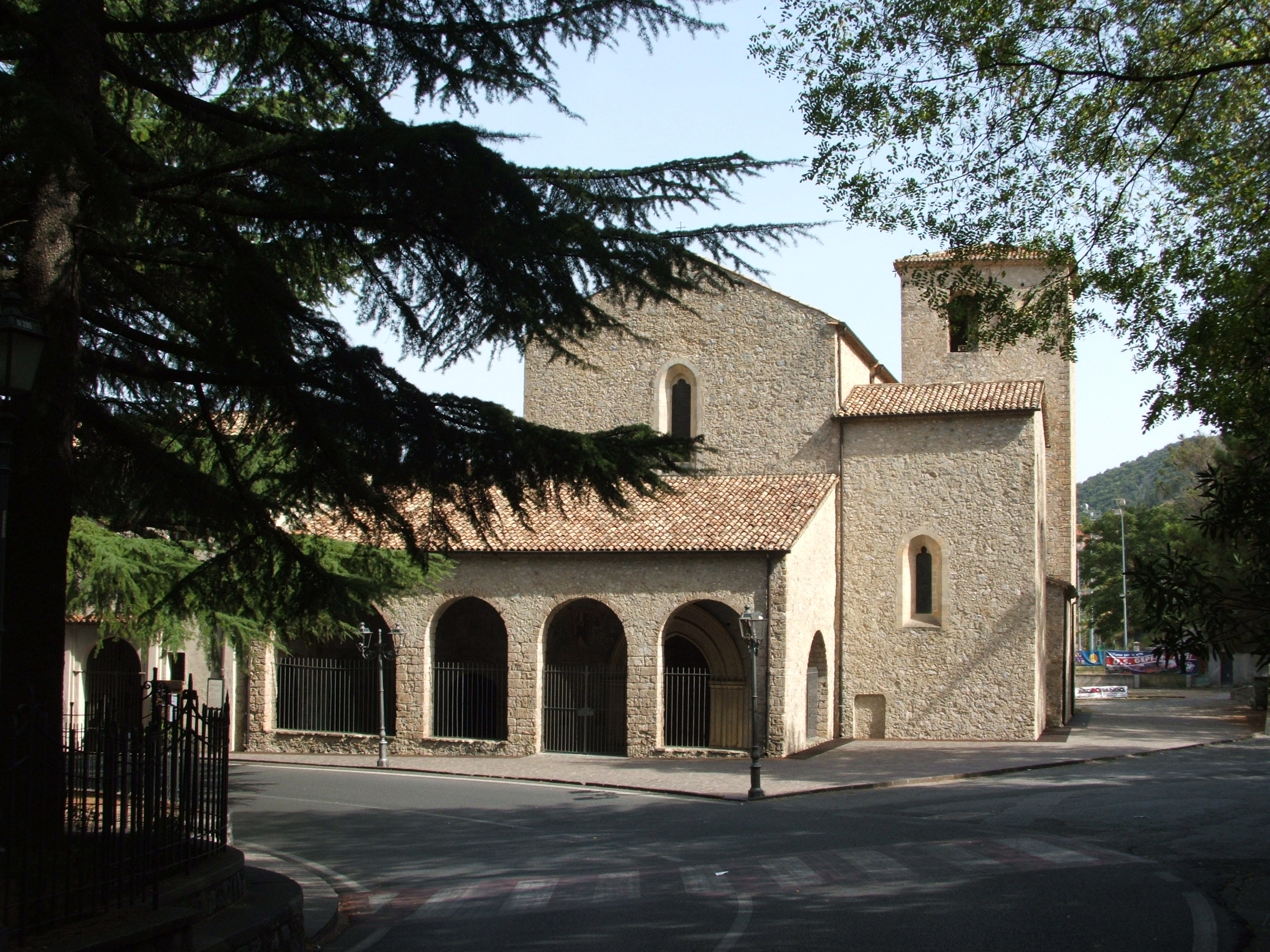 Monastero di San Bernardino da Siena; Morano Calabro (Cosenza)